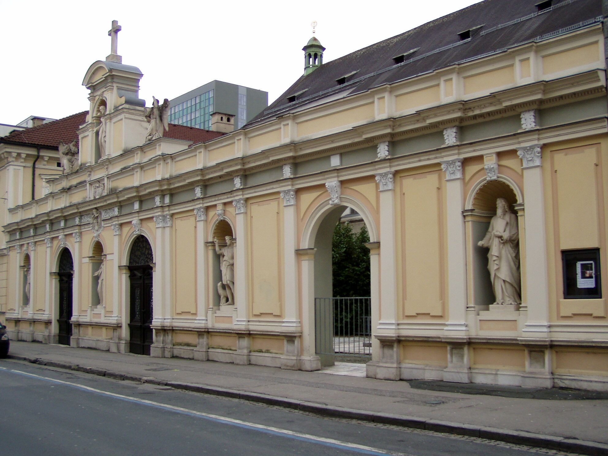 Dom zu Klagenfurt / Klagenfurt Cathedral: Nordseitige Fassadenwand zur Lidmanskygasse